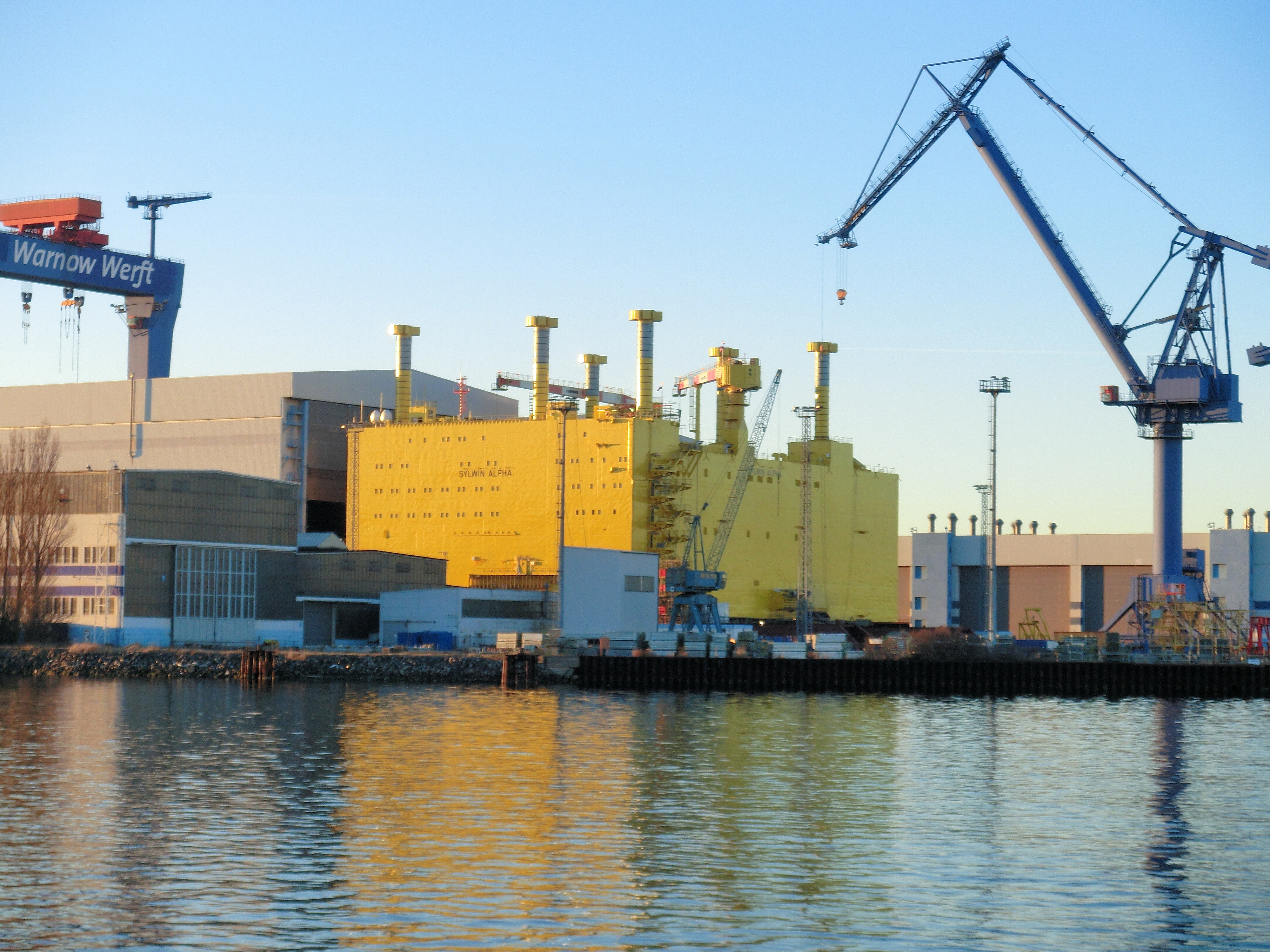 Bau der Offshore-Konverterplattform SylWin alpha in der Warnowwerft Rostock